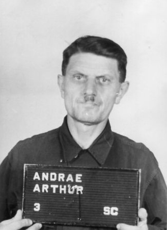 Foto vom haftbogen des Angeklagten Arthur Kurt Andrae (21.1.1900 in Voigtsdorf/Sachsen - ?), ab Juni 1933 Wachmann im KZ Sachsenburg; 1937/38 am Aufbau des KZ Buchenwald beteiligt; 1939 im KZ Lichtenburg tätig; Oktober 1943 - April 1945 SS-Hauptscharführer in der Poststelle des Konzentrationslager Mittelbau-Dora tätig; im Dachauer Nordhausen-Prozess ("Case No. 000-50-37 Dora") am 30.12.1947 zu zwanzig Jahren Haft verurteilt.